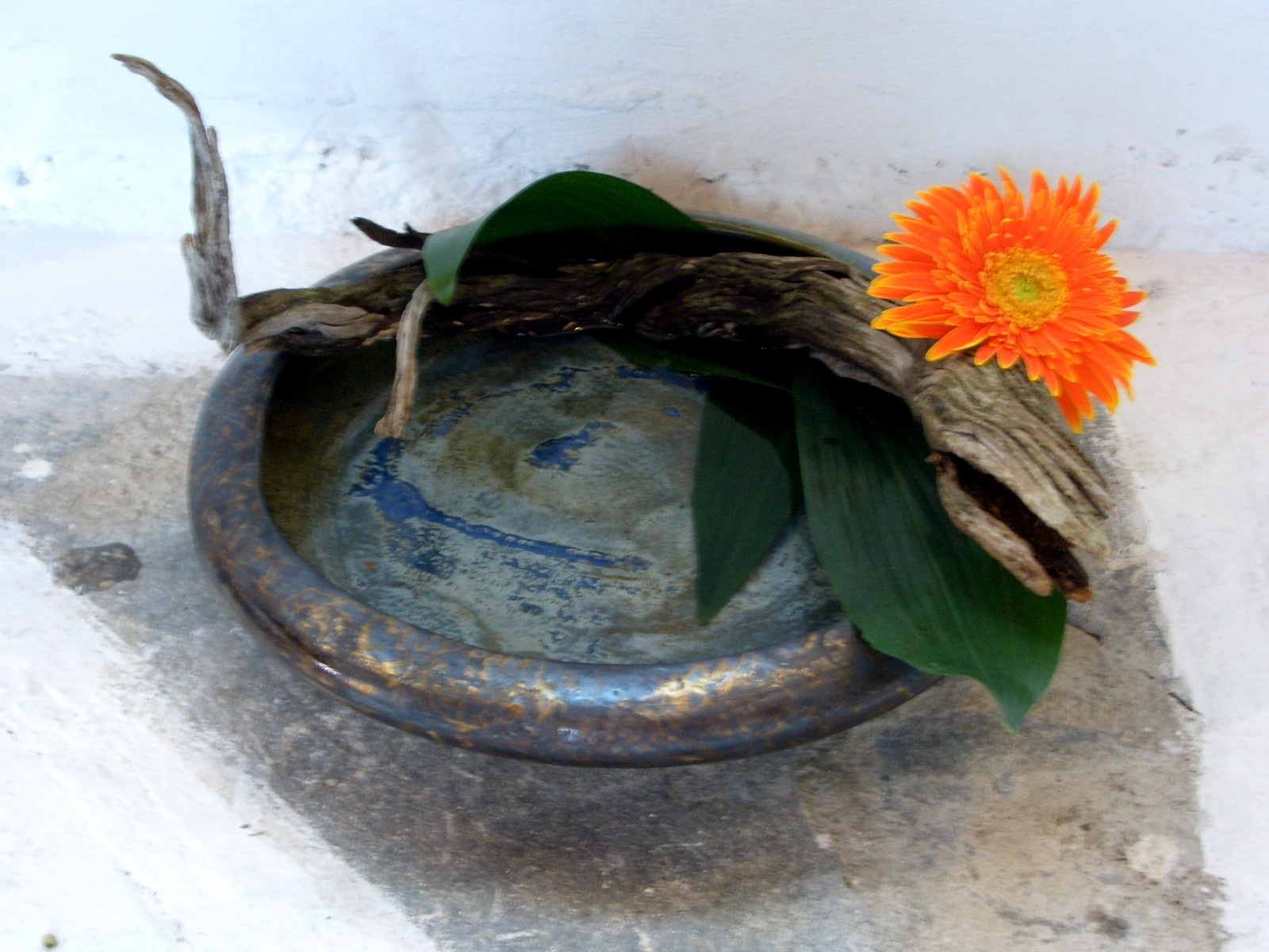 Composizione Ikebana. Foto scattata al seminario Eota (European Ohara Teachers Association) svoltosi in Grecia nellâ€™ottobre 2005. Composizione e foto eseguite da Rossella F. secondo master associato della Scuola Ohara di Tokyo, che ne autorizza il rilascio con la licenza sottoindicata.